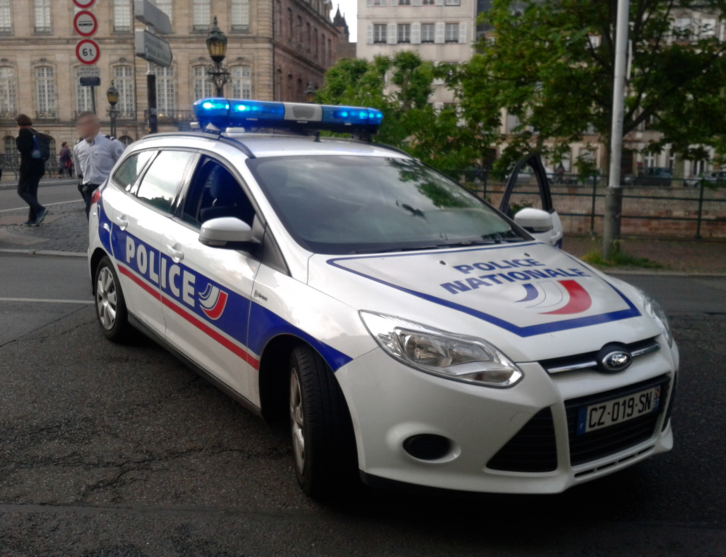 Blocage de la circulation par une Ford de la police nationale à Strasbourg en juin 2014